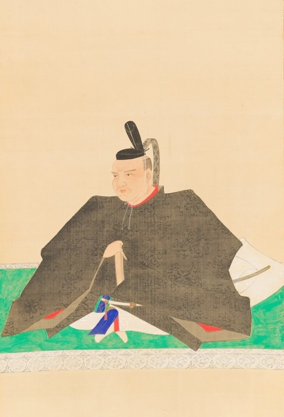 松平直政の肖像。